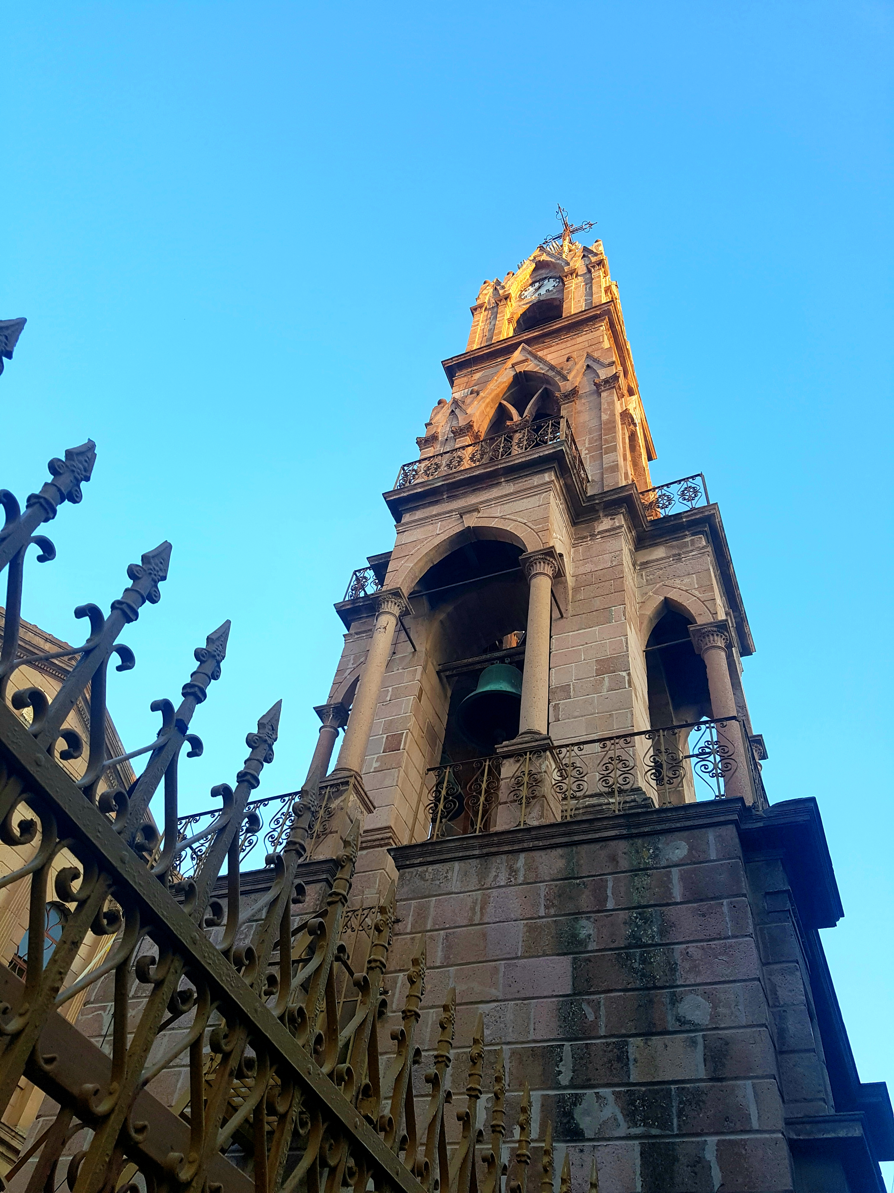 Ο ναός του Αγίου Αθανασίου, μητροπολιτικός ναός της Μυτιλήνης.